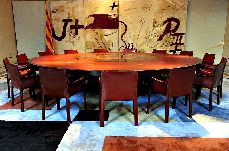 Palau de la Generalitat (Barcelona)